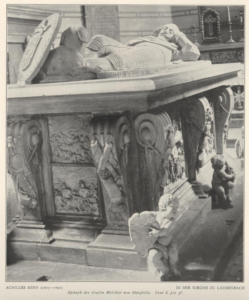 Herzgrabmal Melchior von Hatzfeld, Bergkirche Laudenbach, Franken